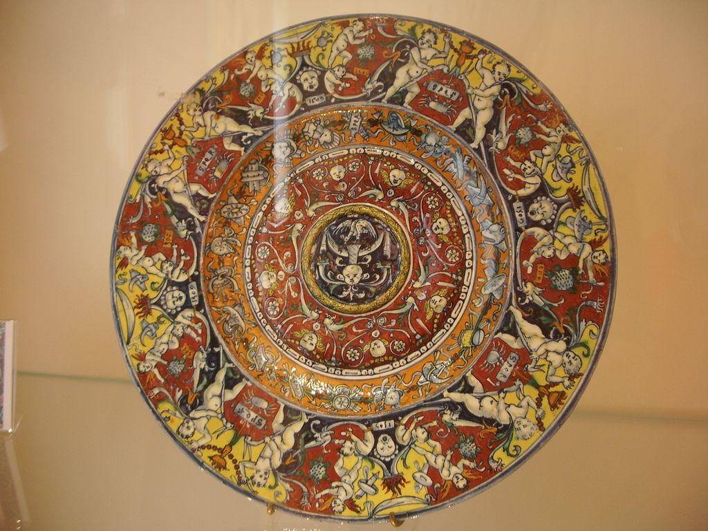 Antico bacile datato 1509 e chiamato "Il Rosso di Montelupo" a causa del pigmento di colore rosso usato per la sua decorazione.